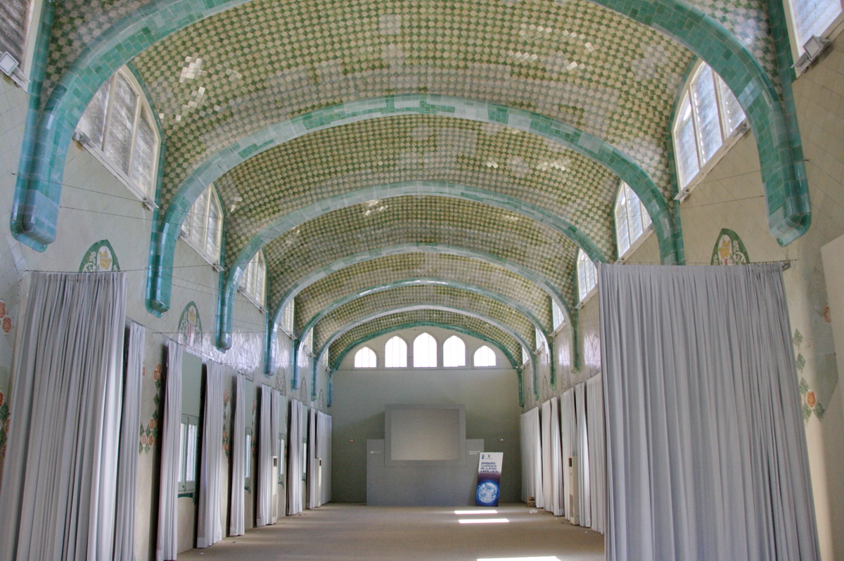 Interior del pavelló de Sant Rafael de l'hospital de Sant Pau (Barcelona, Catalunya), obra modernista de 1905 de l'arquitecte Lluís Domènech i Montaner